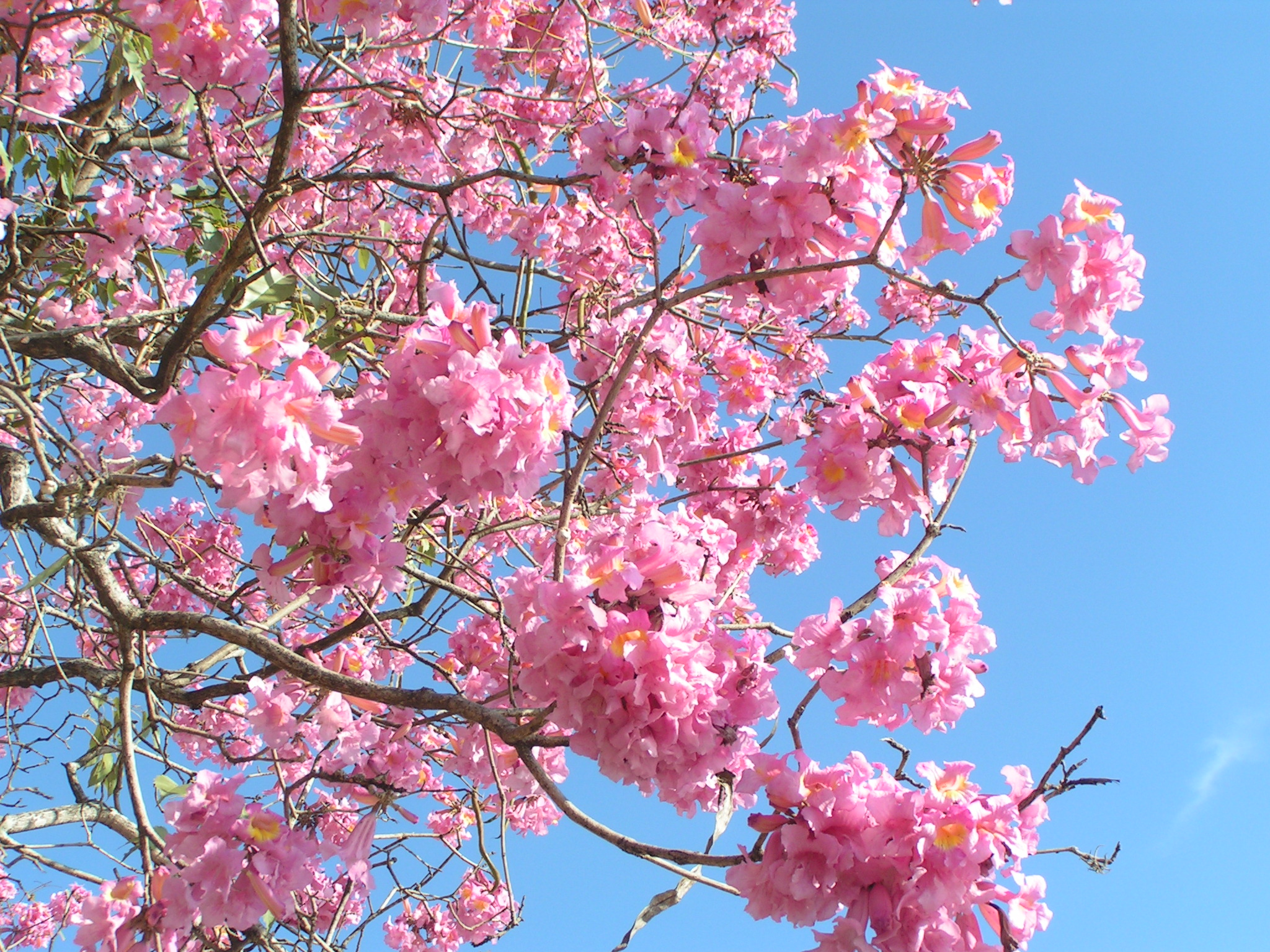 Hojas de Lapacho rosado (Tabebuia impetiginosa)